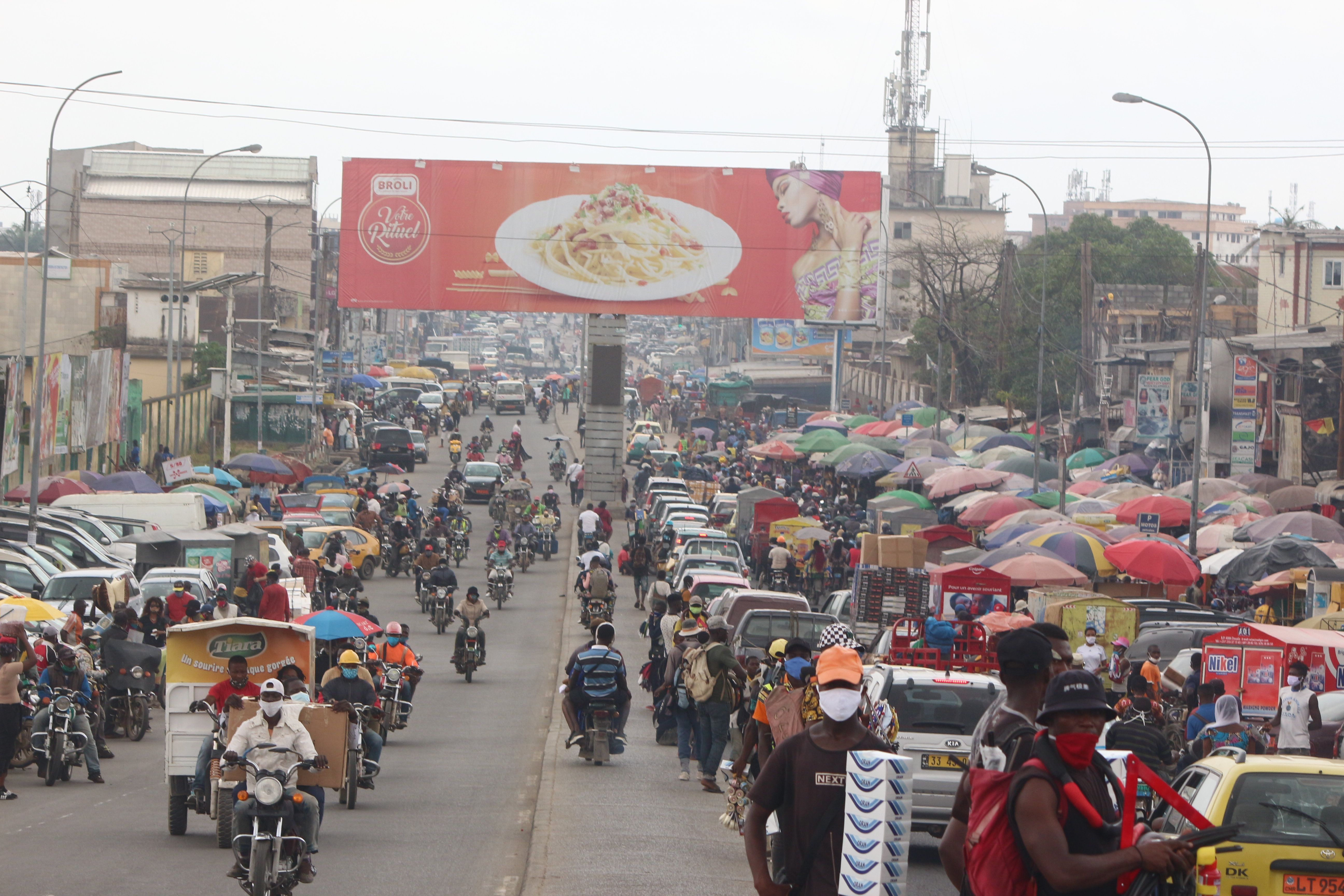 Un aperçu de la rue en face du marché Mboppi à Douala This is an image with the theme "Africa on the Move or Transport" from: Cameroon